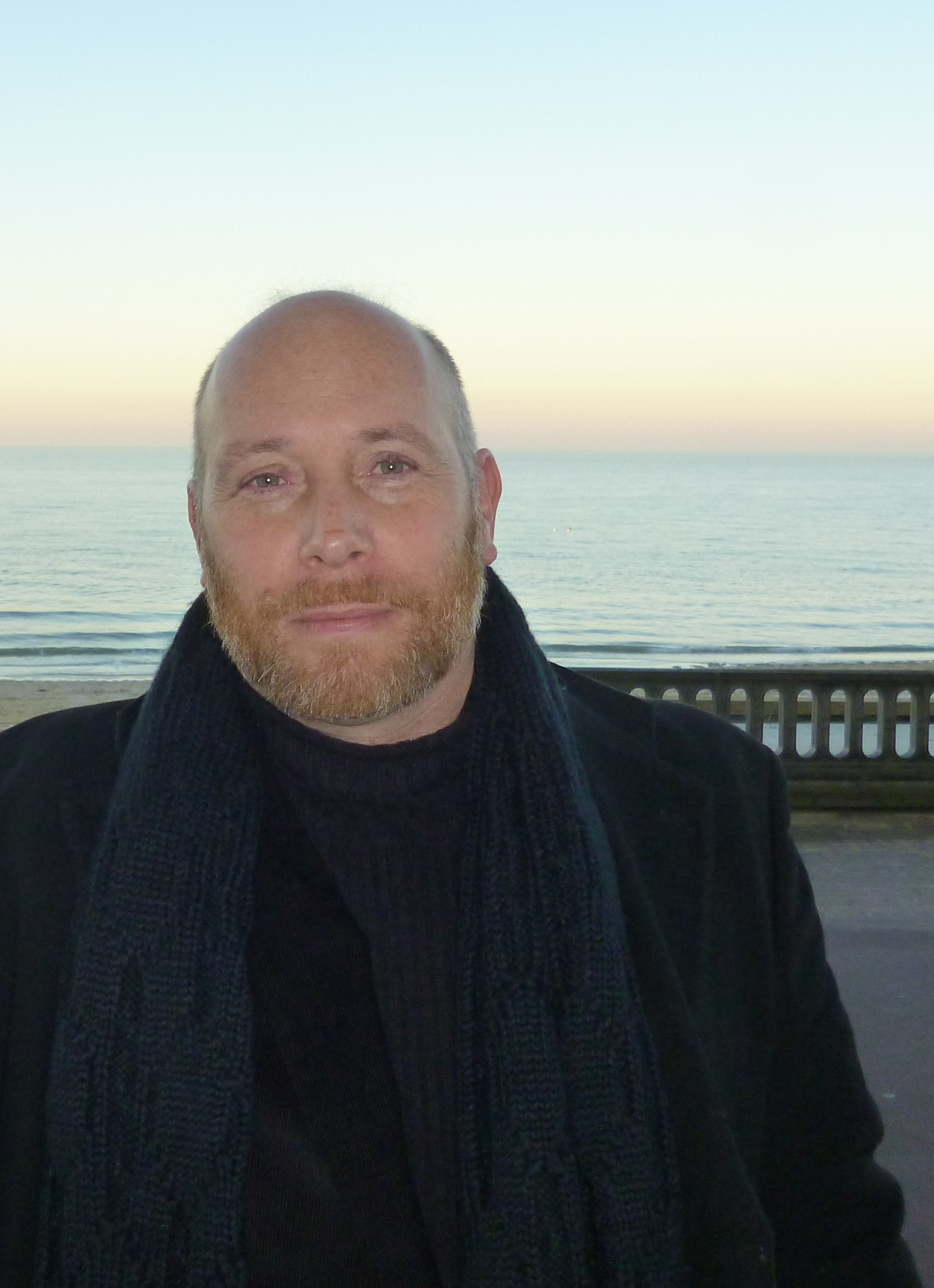 Photo du poete Seegan Mabesoone